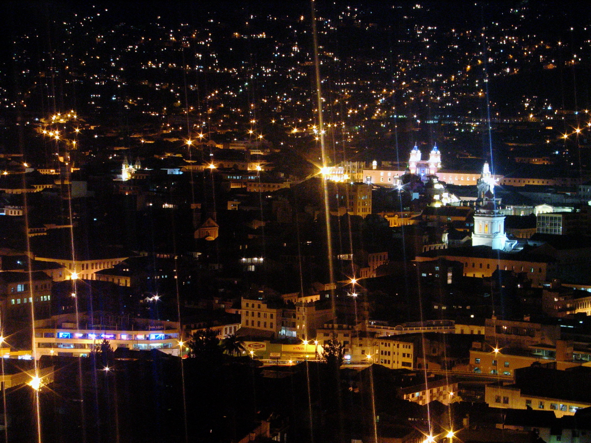 Centro Histórico de Quito por la noche, visto desde el Itchimbía